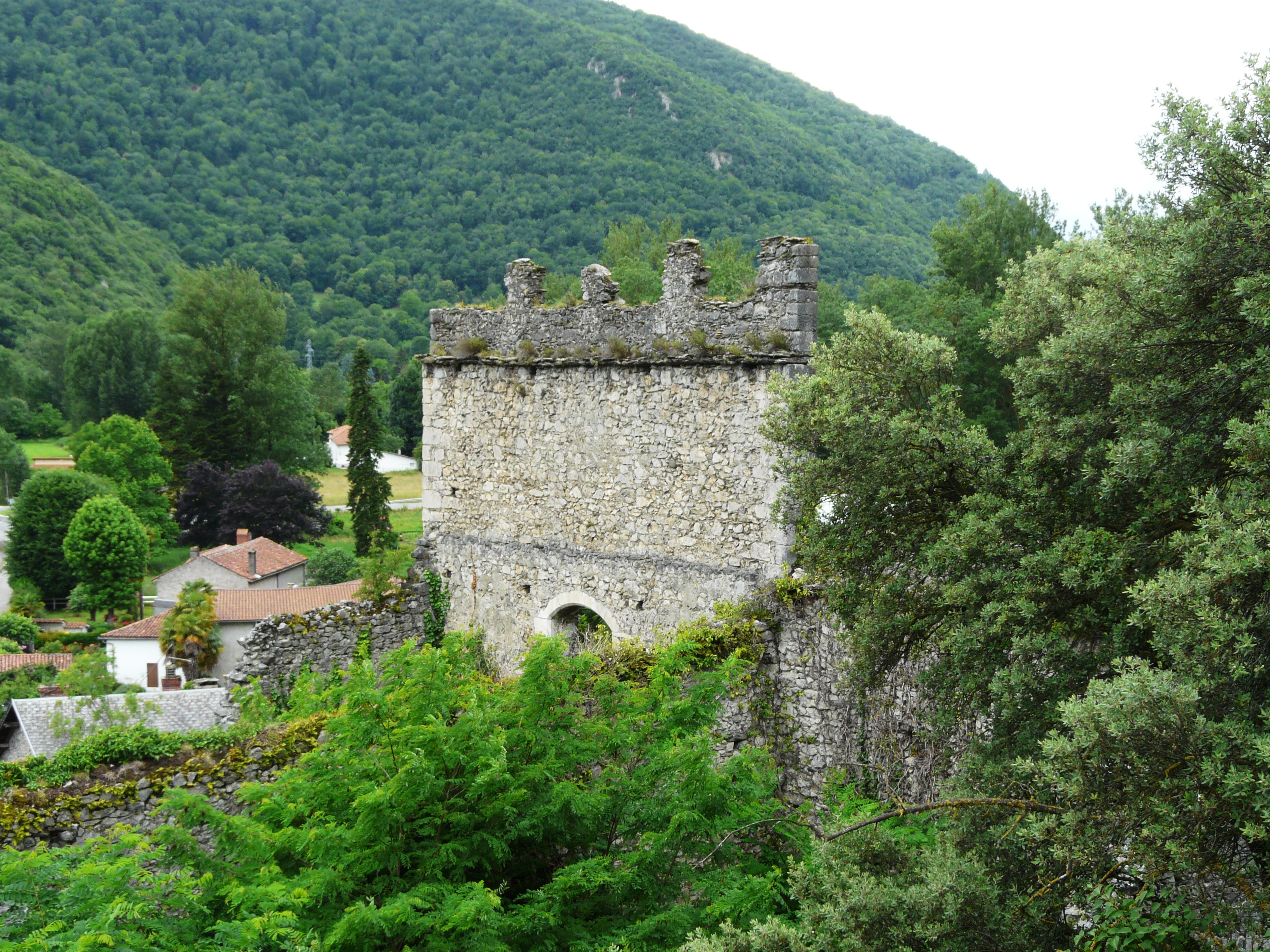 Les ruines du château dans le village de Galié, Haute-Garonne, France.